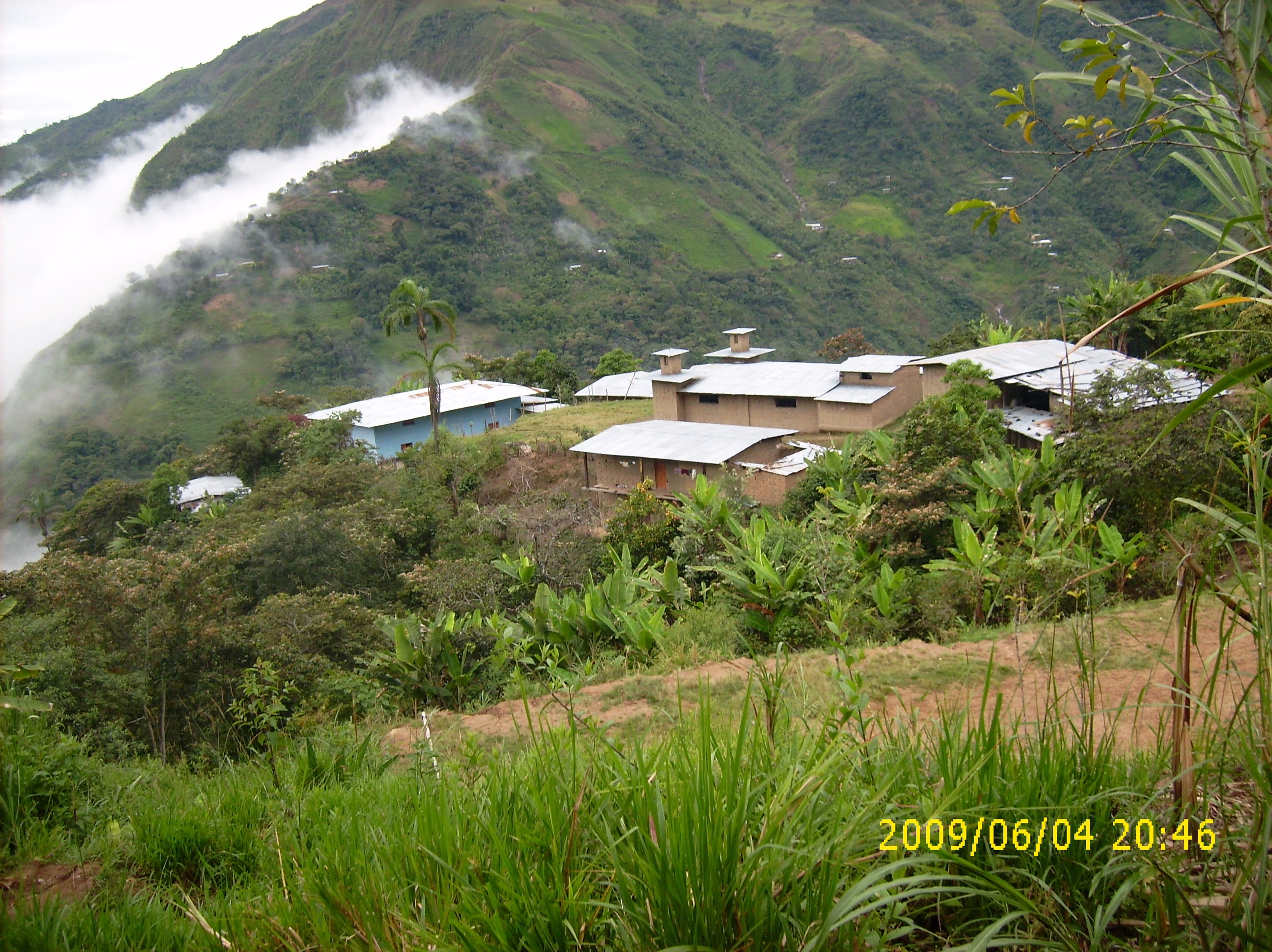 loma de la esperanza-hbba-piura